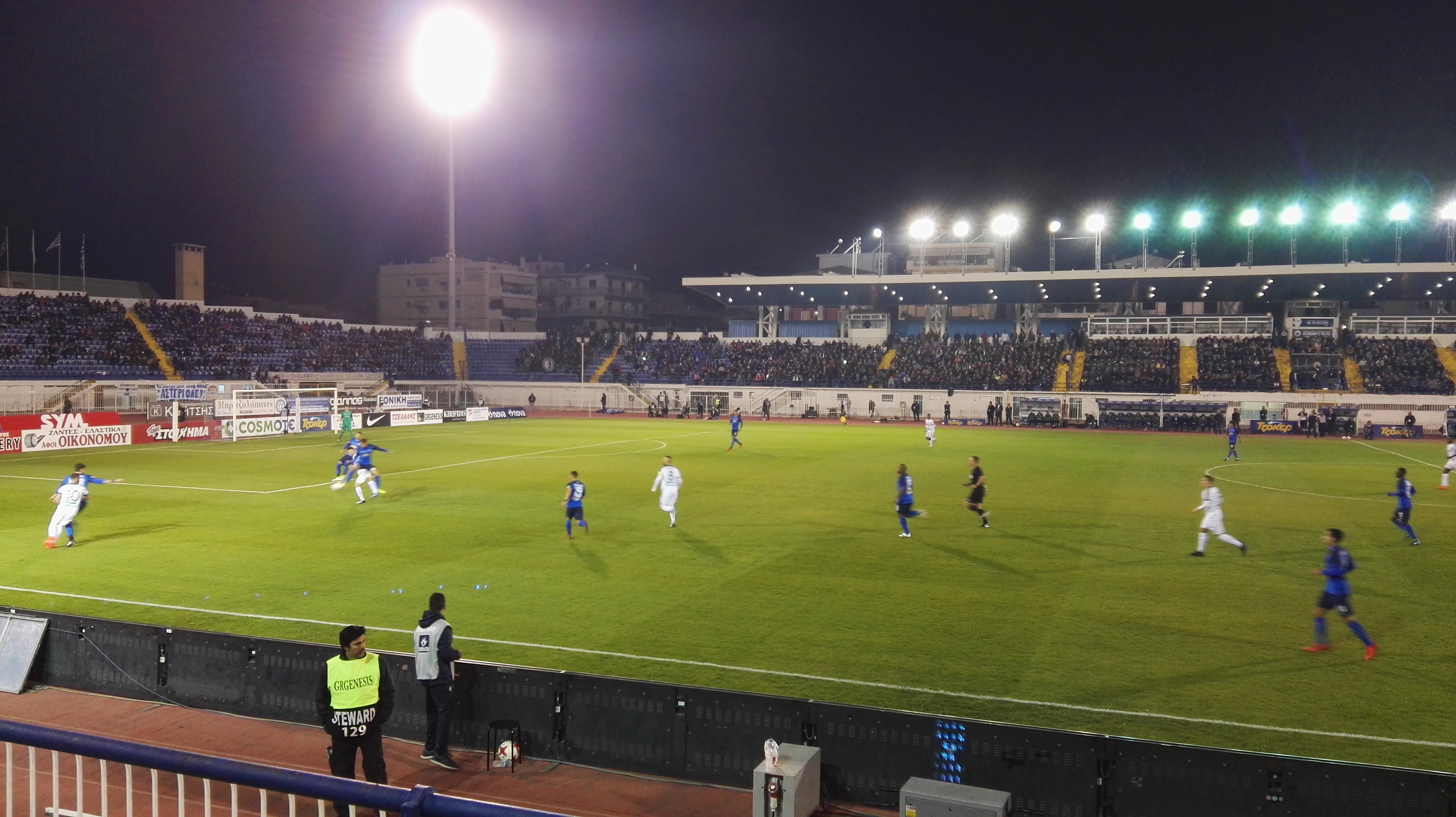 Fußballspiel Atromitos FC gegen Panathinaikos Athen im November 2017